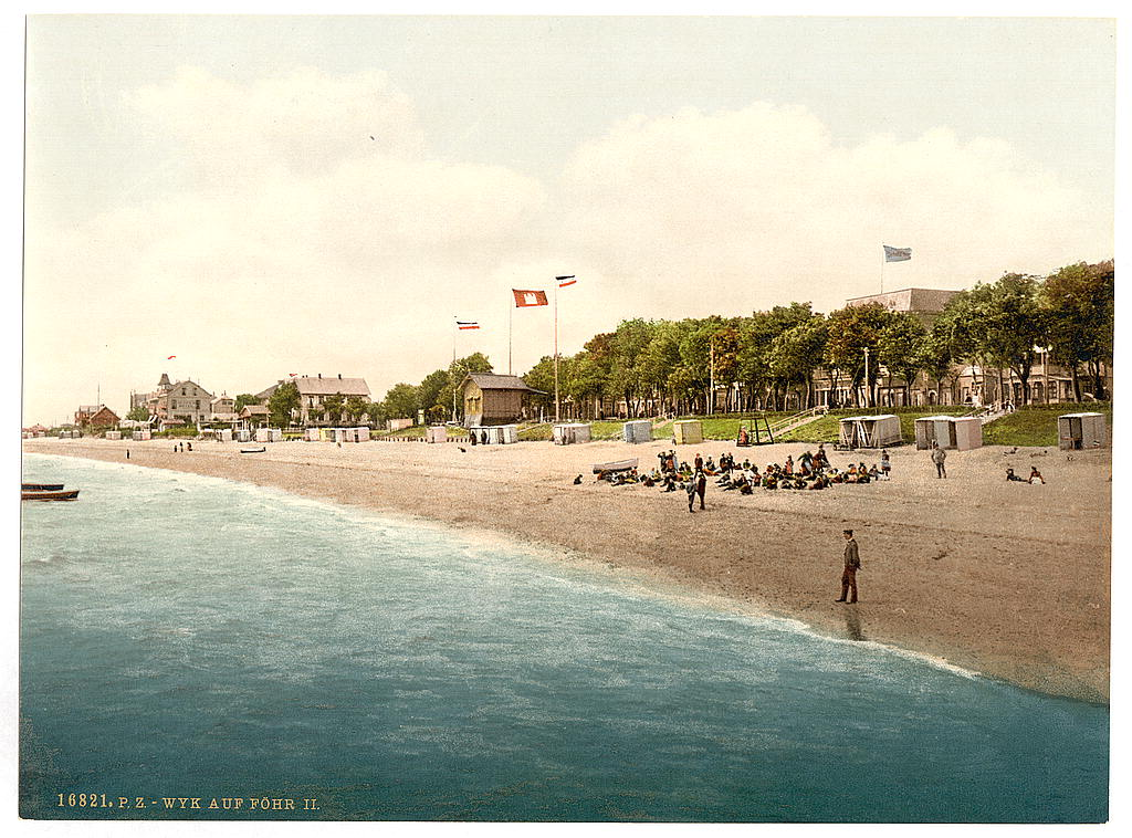 Strand, Wyk auf Föhr, 1890er